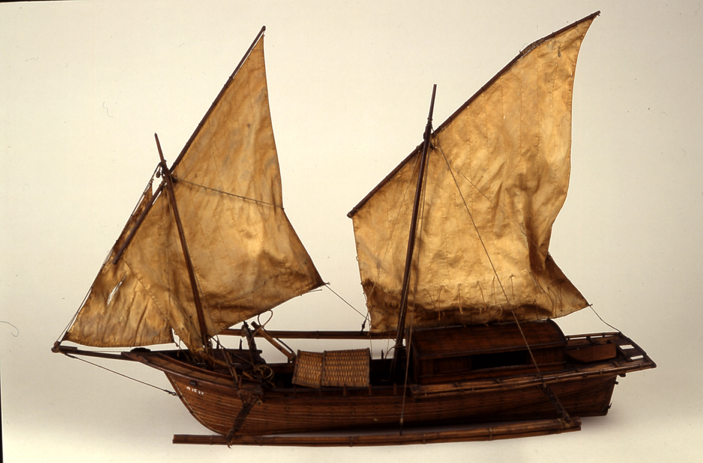 De Forma de lancha con la popa plana; espaciosa cámara hacia popa y ésta como la proa está rodeada de un pasadizo de cañas exterior al casco apoyado sobre las grandes perchas que sostiene las dos batangas que usa. Lleva dos palos con velas quechemarinas o latina y cuadra de tela burda y un botalón en su foque.Embarcación usada en Filipinas, especialmente en la bahía de Manila, para conducir el pasaje entre la capital y Cavite. Trabajo indígena. Como es muy fina, escora mucho, a pesar de las batangas, cuando el viento arrecia. Exposición General Islas Filipinas: Madrid 30 junio 1887 Monleón, Rafael: Construcciones navales bajo su aspecto astístico. Catálogo descriptivo, Madrid 1891.Catálogo de la Exposición General de las Islas Filipinas, celebrada en Madrid, inaugurada por S. M. La Reina Regente, el 30 de junio de 1887. Madrid: Est. Tipográfico de Ricardo Fe, 1887.Catalogos Museo Naval: Año 1894 (sala IV colonis nº 62)